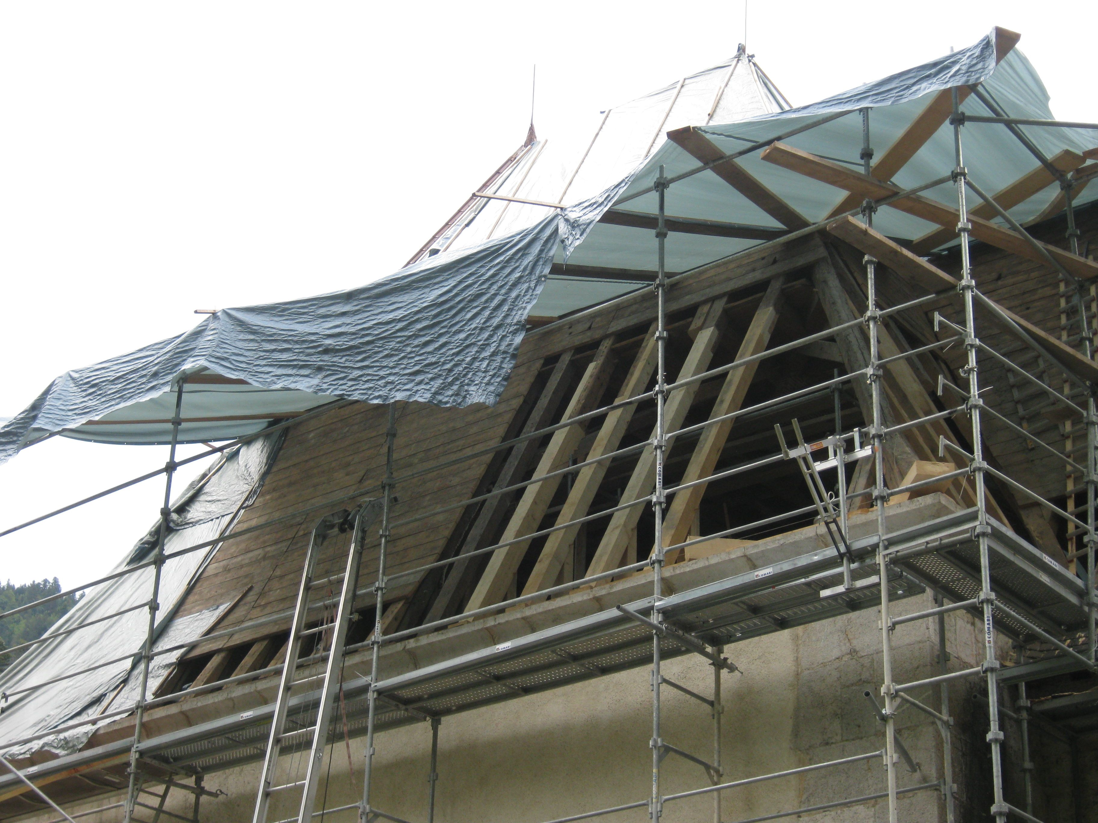 toiture en réfection